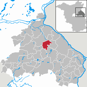 Bliesdorf in Brandenburg (Country) - District Märkisch-Oderland